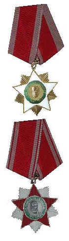 Bulgaarse orde, de twee graden of klassen. According to the Bulgarian Copyright and Neighboring Rights Act (as amended in 2011), Chapter 2, Article 4, the following documents "shall not be considered objects of copyright": normative and individual acts of government bodies and official translations thereof; ideas and concepts; works of folklore; news, facts, information and data. Hence it is assumed that this image has been released into the public domain. However, in some instances the use of this image might be regulated by other laws.